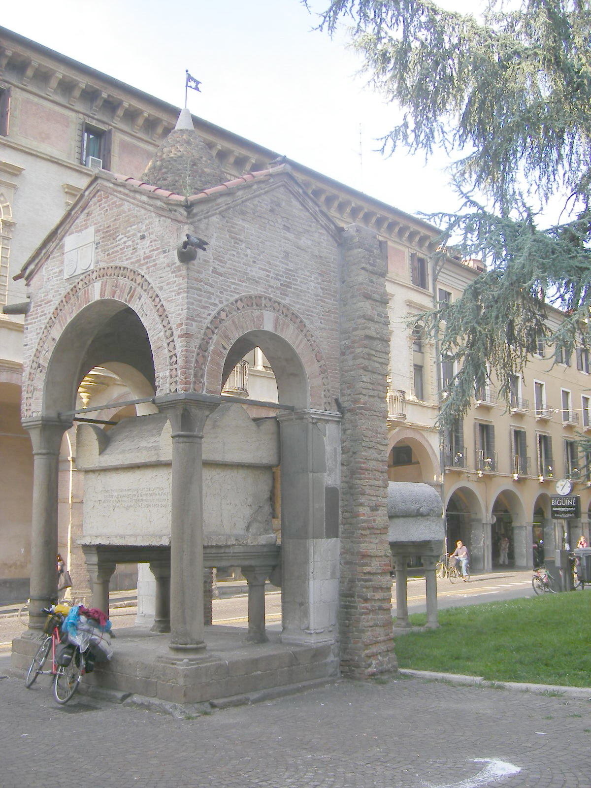 Padova